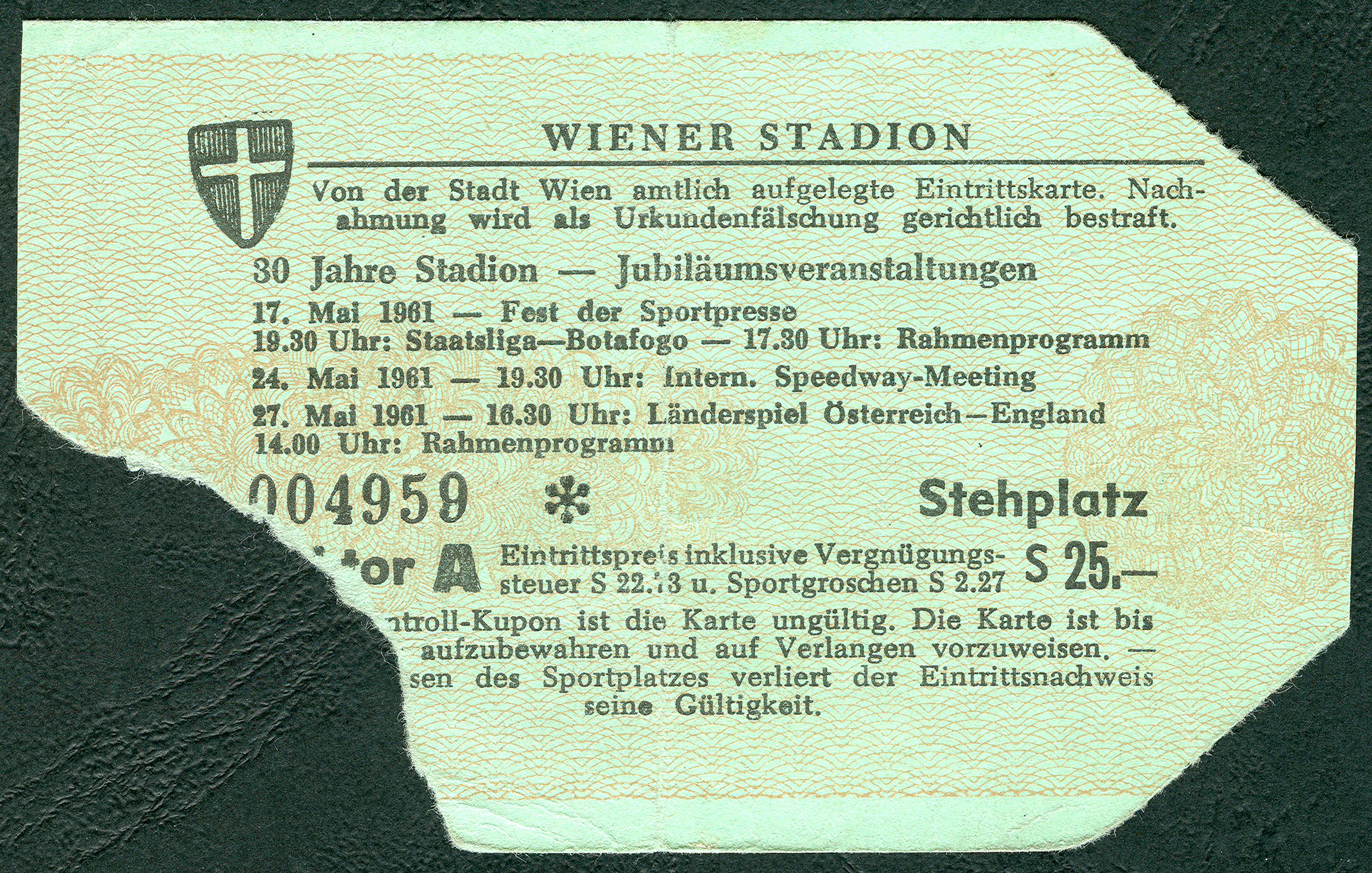 „Wiener Stadion / Von der Stadt Wien amtlich aufgelegte Eintrittskarte. Nachahmung wird als Nachahmung gerichtlich bestraft. / 30 Jahre Stadion - Jubiläumsveranstaltungen / 17. Mai 1961 - Fest der Sportpresse / 19.30 Uhr: Staatsliga - Botafogo - 17.30 Uhr Rahmenprogramm / 24. Mai 1961 - 19.30 Uhr: Internat. Speedway-Meeting / 27. Mai 1961 - 16.30 Uhr: Länderspiel Österreich - England / 14.00 Uhr: Rahmenprogramm / 004959 Stehplatz / ...tor A Eintrittspreis inklusive Vergnügungssteuer S 22.73 und Sportgroschen S 2.27 / ... Kontroll-Kupon ist die Karte ungültig. Die Karte ist bis ... aufzubewahren und auf Verlangen vorzuweisen. - / ...sen des Sportplatzes verliert der Eintrittsnachweis / seine Gültigkeit.“ Das Original wurde von Florian Berief, Inhaber des Ladens Presse Tabak Lotto in der Nelkenstraße 32 Ecke Engelbosteler Damm, gemeinsam mit anderen im Schaufenster ausgestellten Dokumenten zur Geschichte des Fußballs freundlicherweise als Leihgabe zum Einscannen gegeben, um es als Digitalisat über Wikimedia Commons nachhaltig allen Menschen zu Bildungszwecken zur Verfügung zu stellen ...